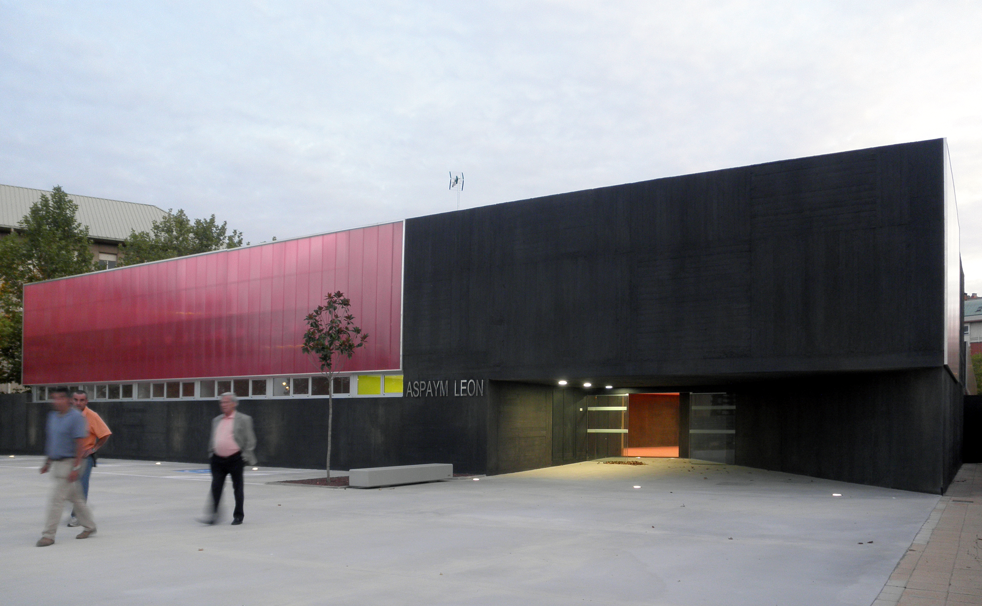 AspaymLeon